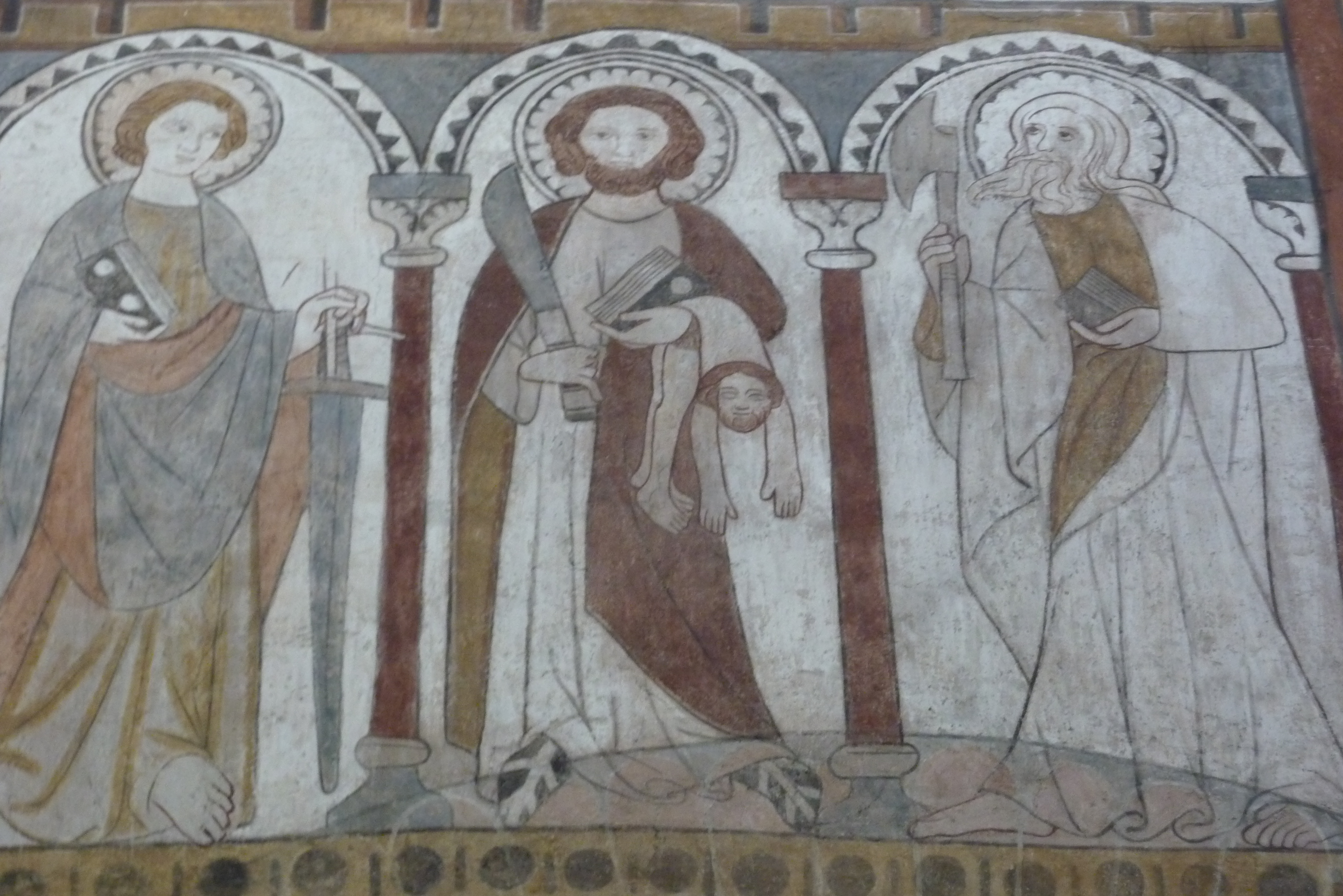 Katholische Pfarrkirche St. Cyriakus in Niedermendig, Wandmalerei zweite Hälfte des 13. Jahrhunderts, Matthias mit Beil, Bartholomäus mit abgezogener Haut, Apostel mit Schwert